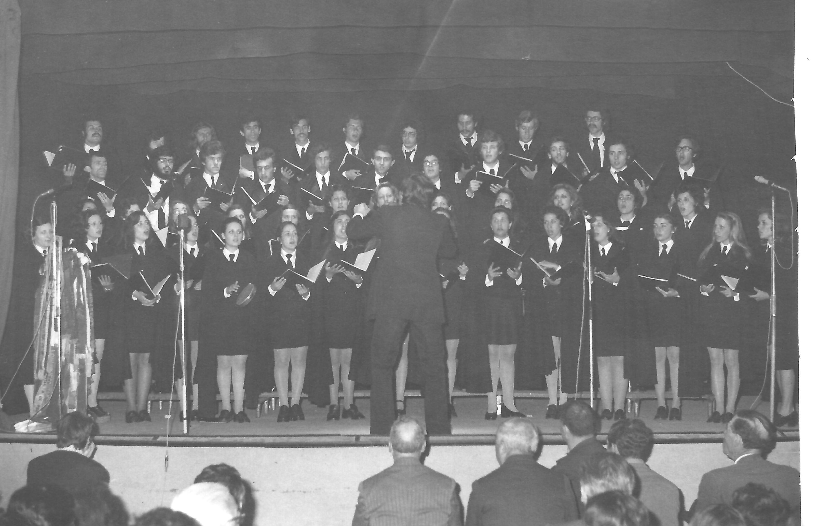 Actuação do OUP em 15 de Junho de 1974